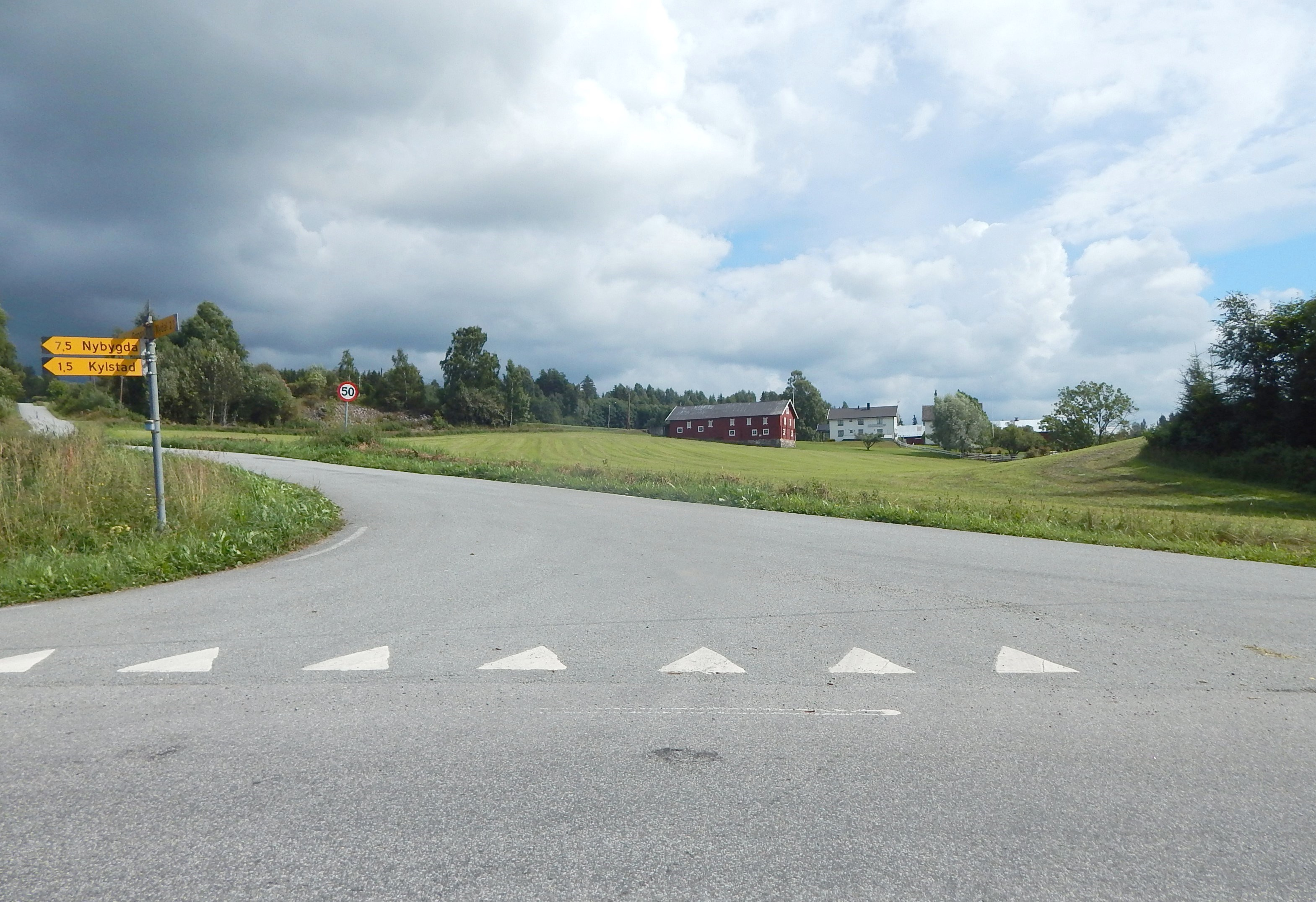 Gålåsgutua (fylkesvei 1728, tidl. 59) sett fra Gjerluvegen